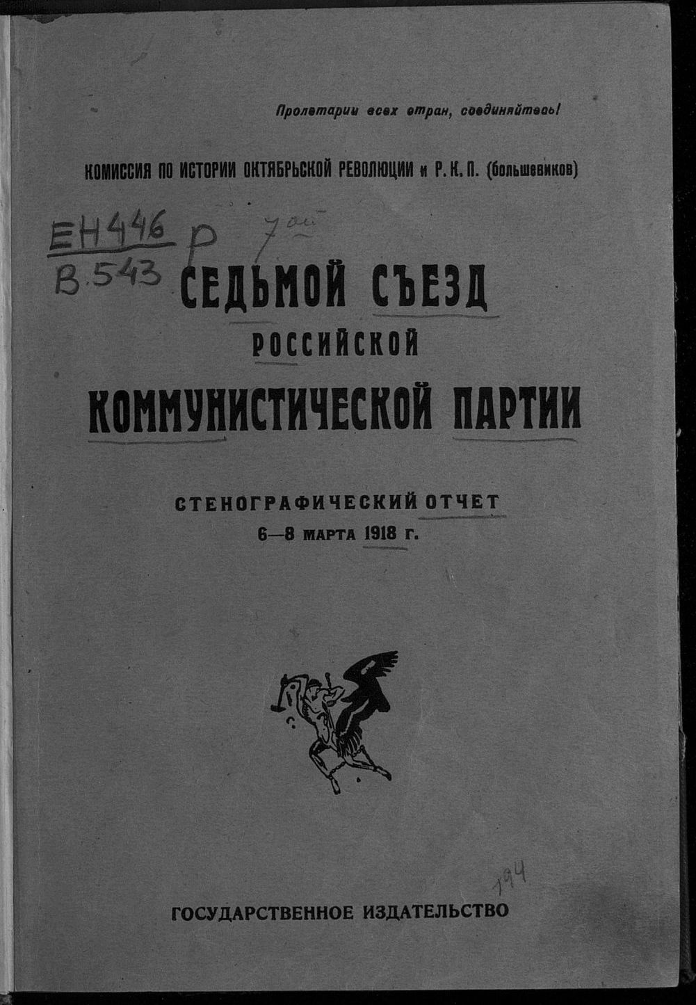 Российская коммунистическая партия (б). Съезд (7; 1918; Петроград). Стенографический отчет 6-8 марта 1918 года / ЦК РКП (б). Комис. по ист. Окт. рев. и РКП (б) (ИСТПАРТ), Седьмой съезд РКП. — М. ; Пг.: Гос. изд-во, 1923. — 212 с.